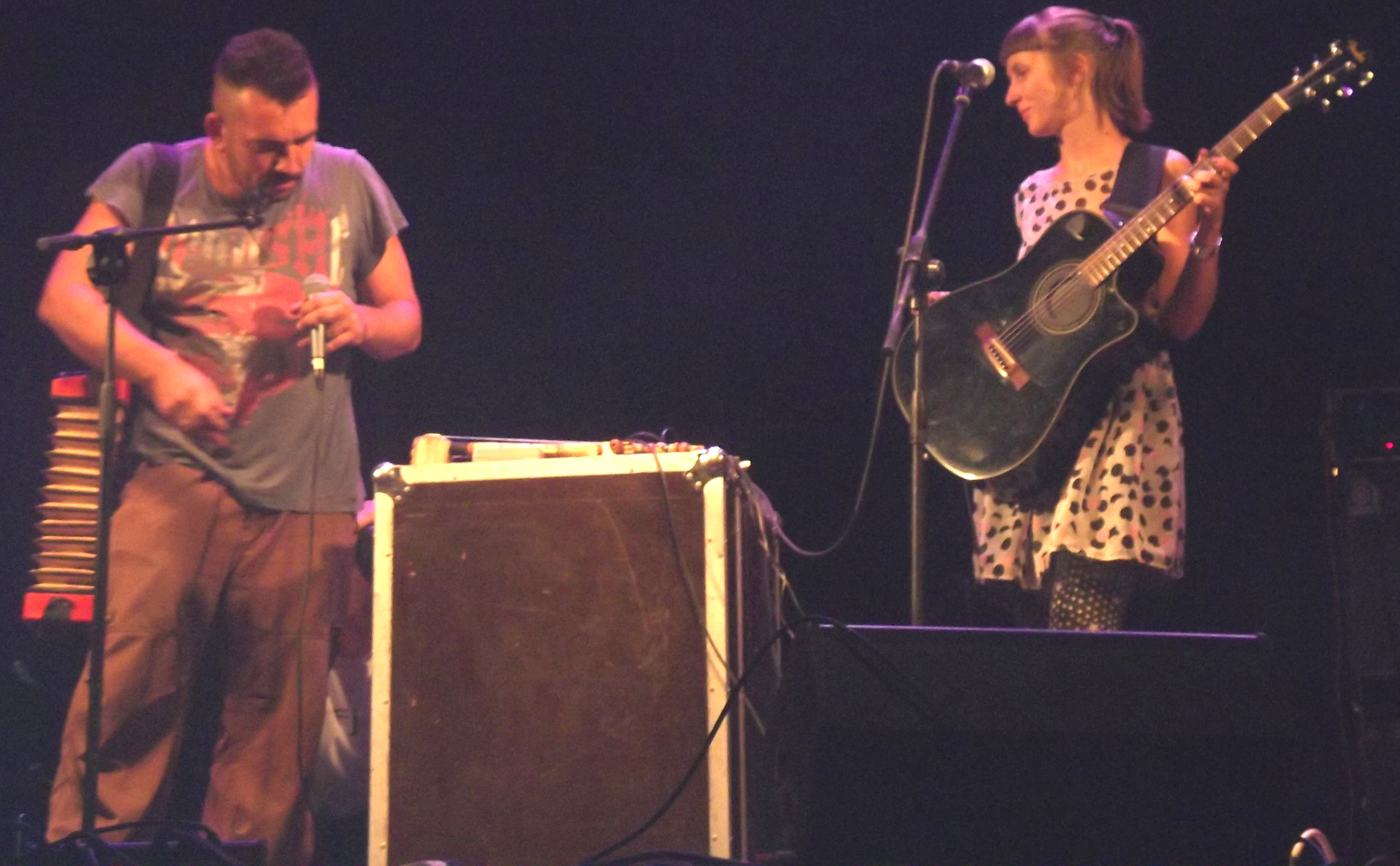 гурт Запаска, Яремче, 2012